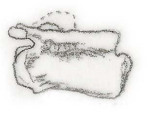 Illustration of a fossil of Jubbulpuria